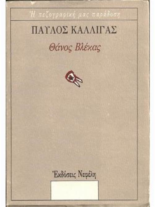 Titel Thanos Vlekas, Ausgabe Nefeli